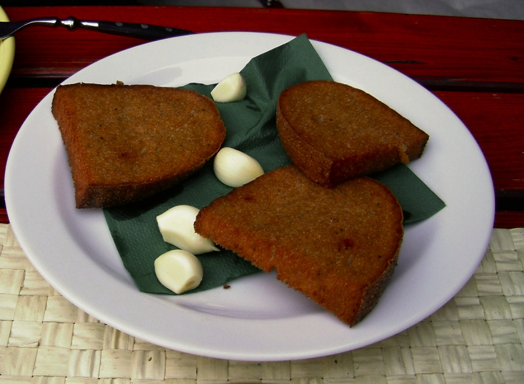 Topinky - eine tschechische Spezialität